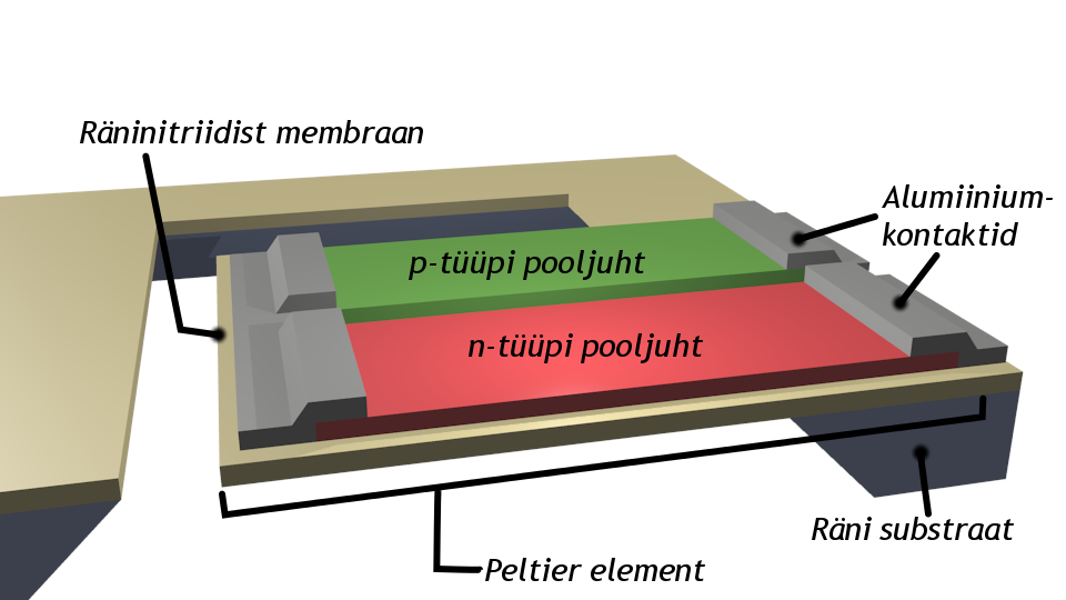 Lateraalne integreeritud Peltier element.